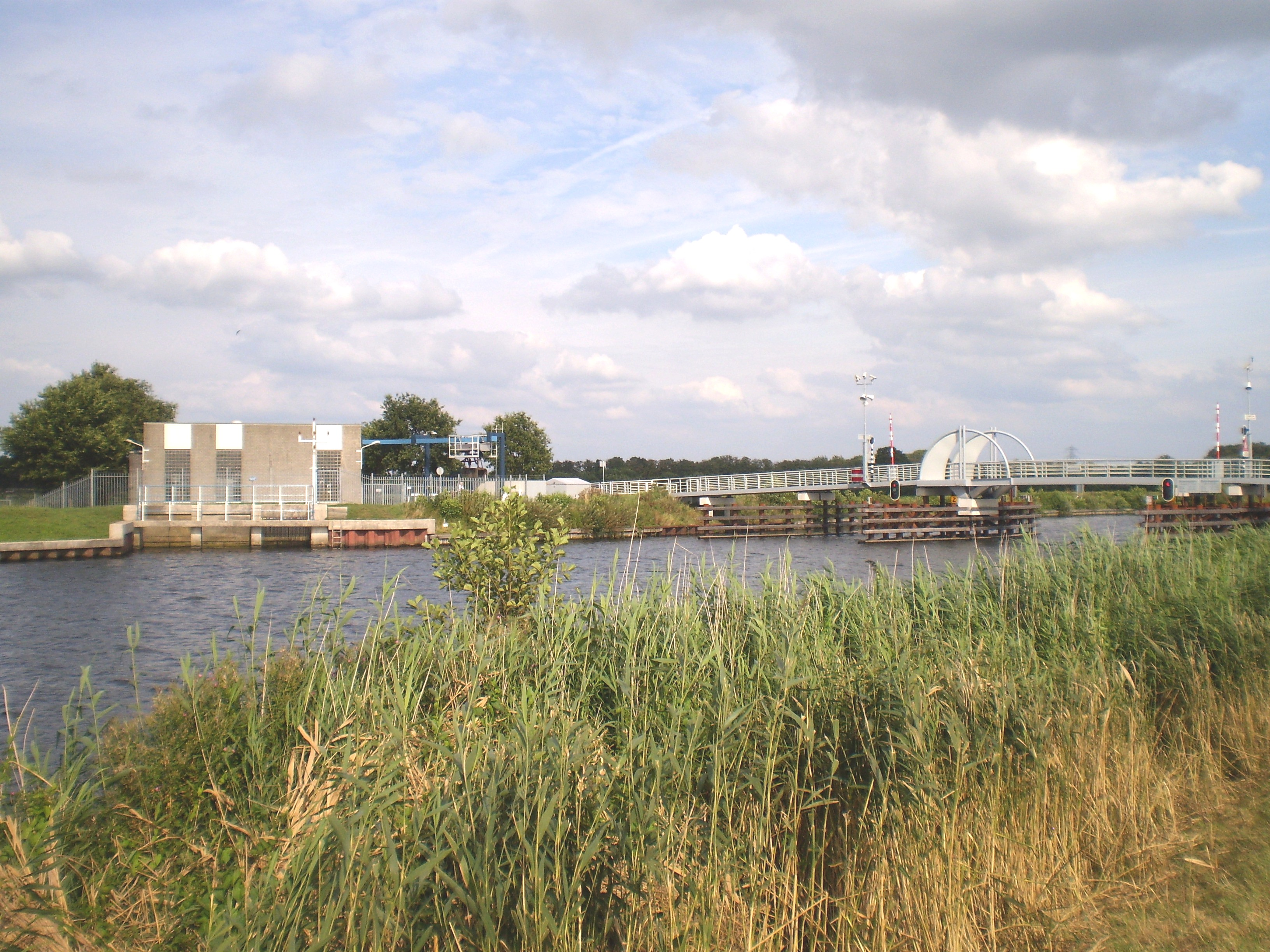 Malebrêge by de Maleslûs. Ofbyld oanbean troch Swarte Kees